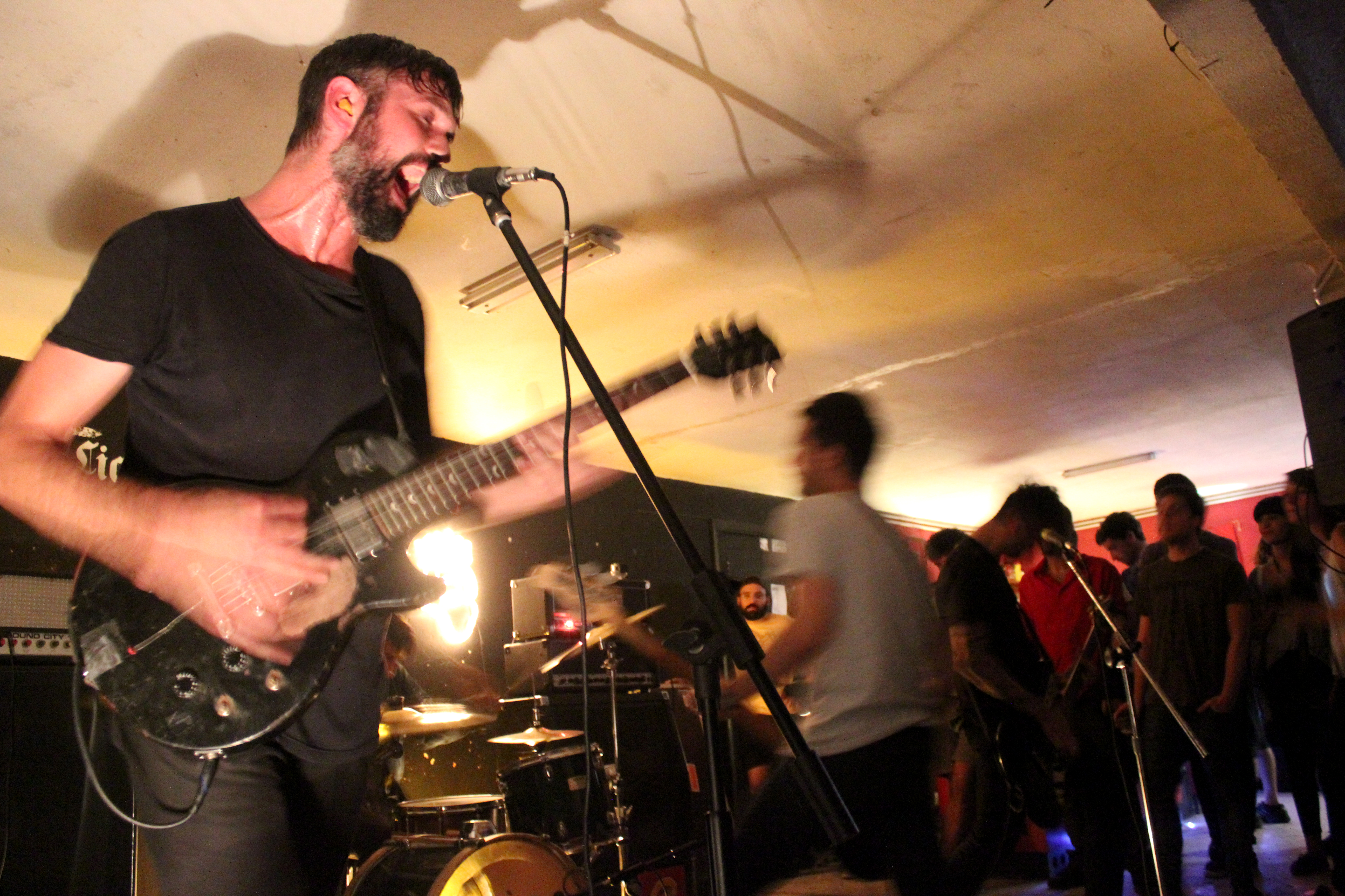 A banda estadounidense Loma Prieta no Liceo Mutante de Pontevedra.